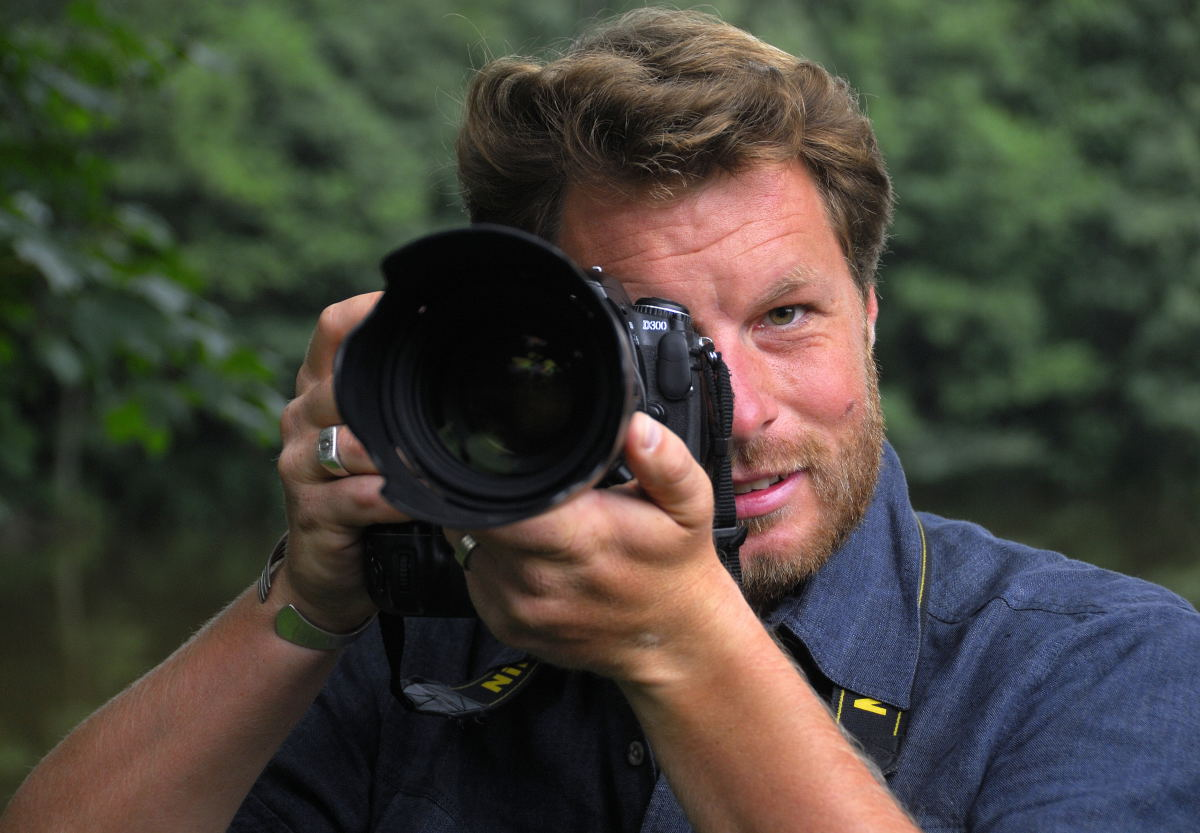 Michael Fokt